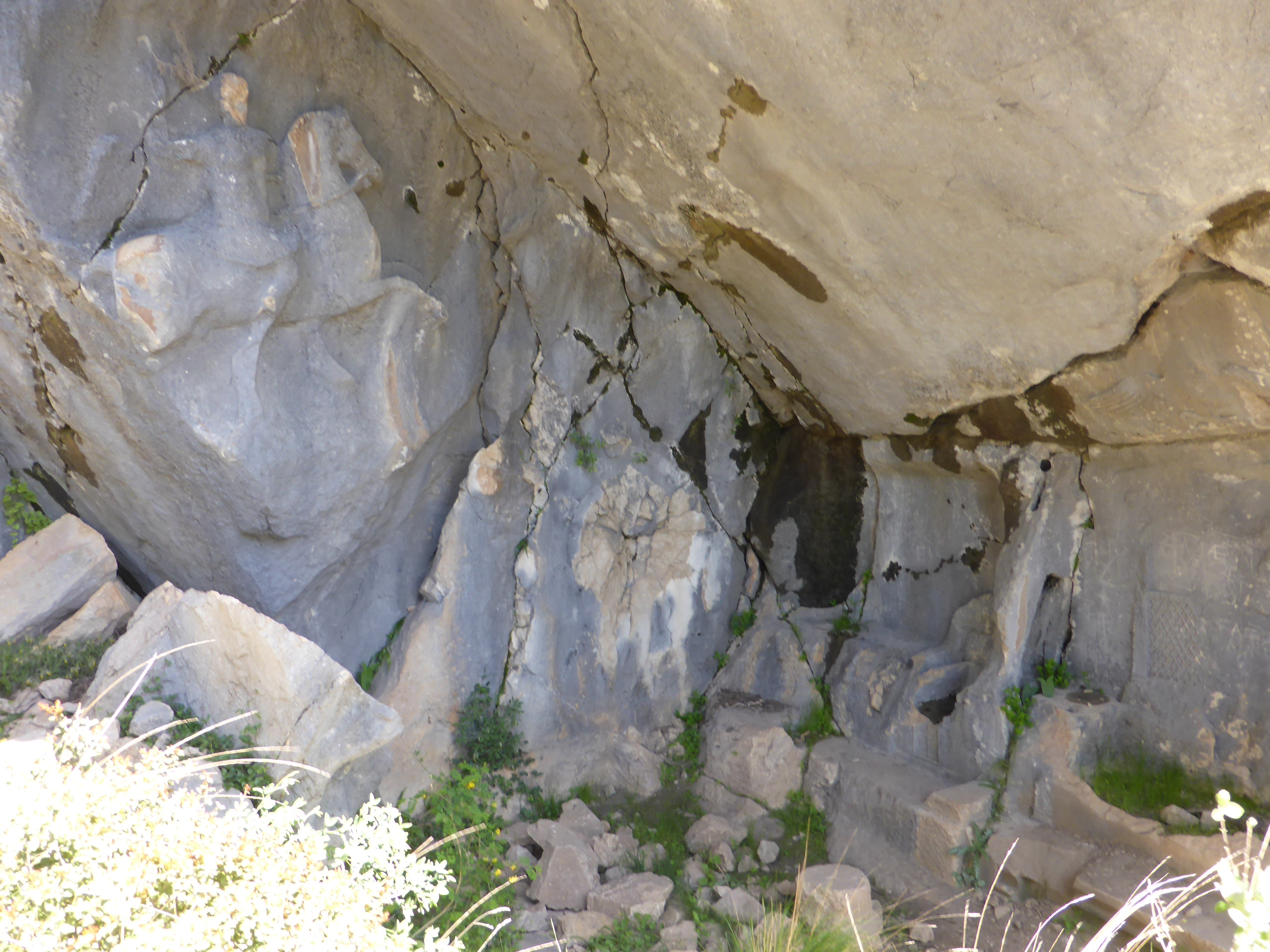 Alketasgrab, Termessos